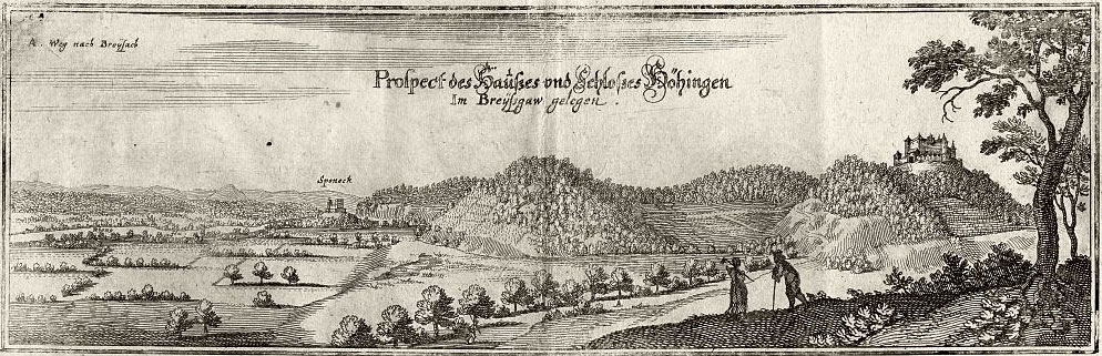 Burg Höhingen in Achkarren, Kupferstich von Matthäus Merian von 1644 (gest. 1650)